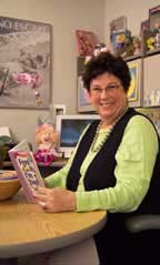 Vicki Lansky